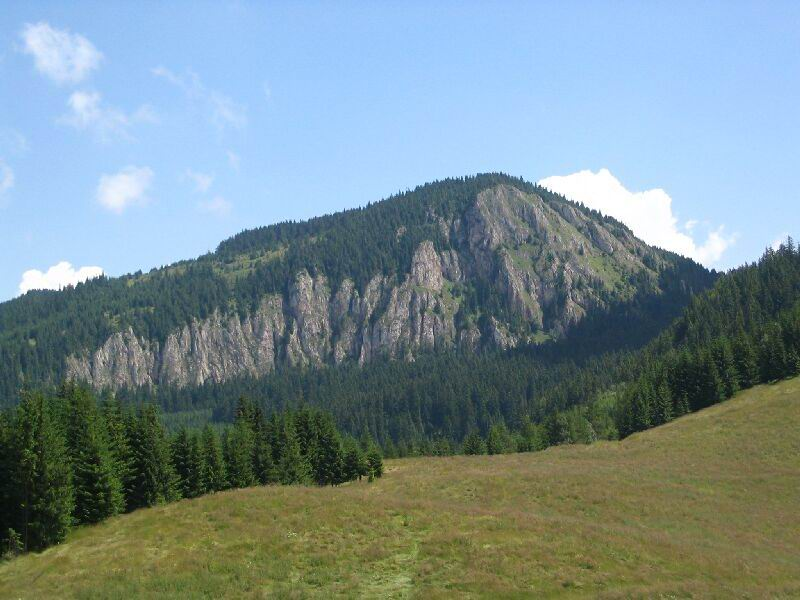 A Veres-kő (1589 m) a Hagymás-hegységben.